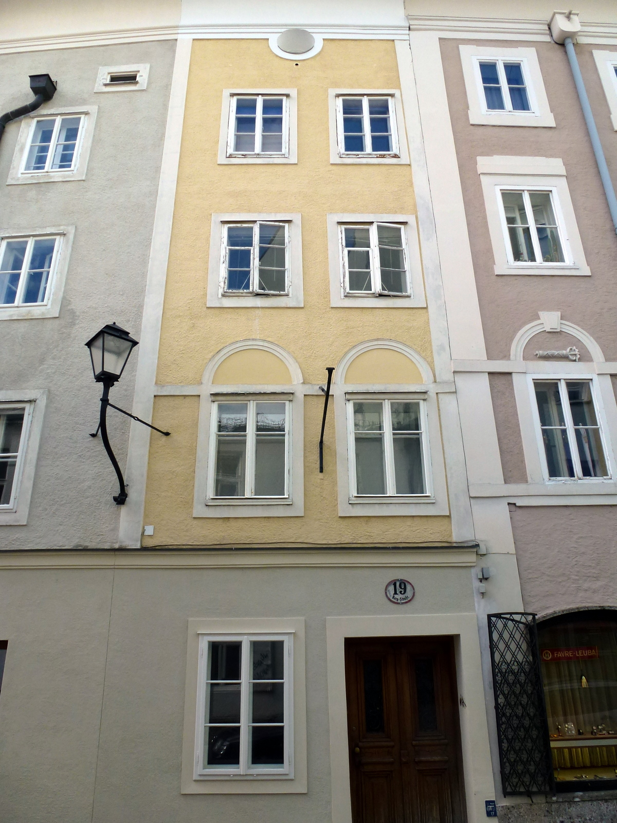 Bürgerhaus, Waserbrennerhaus, Bergstraße 19, Salzburg